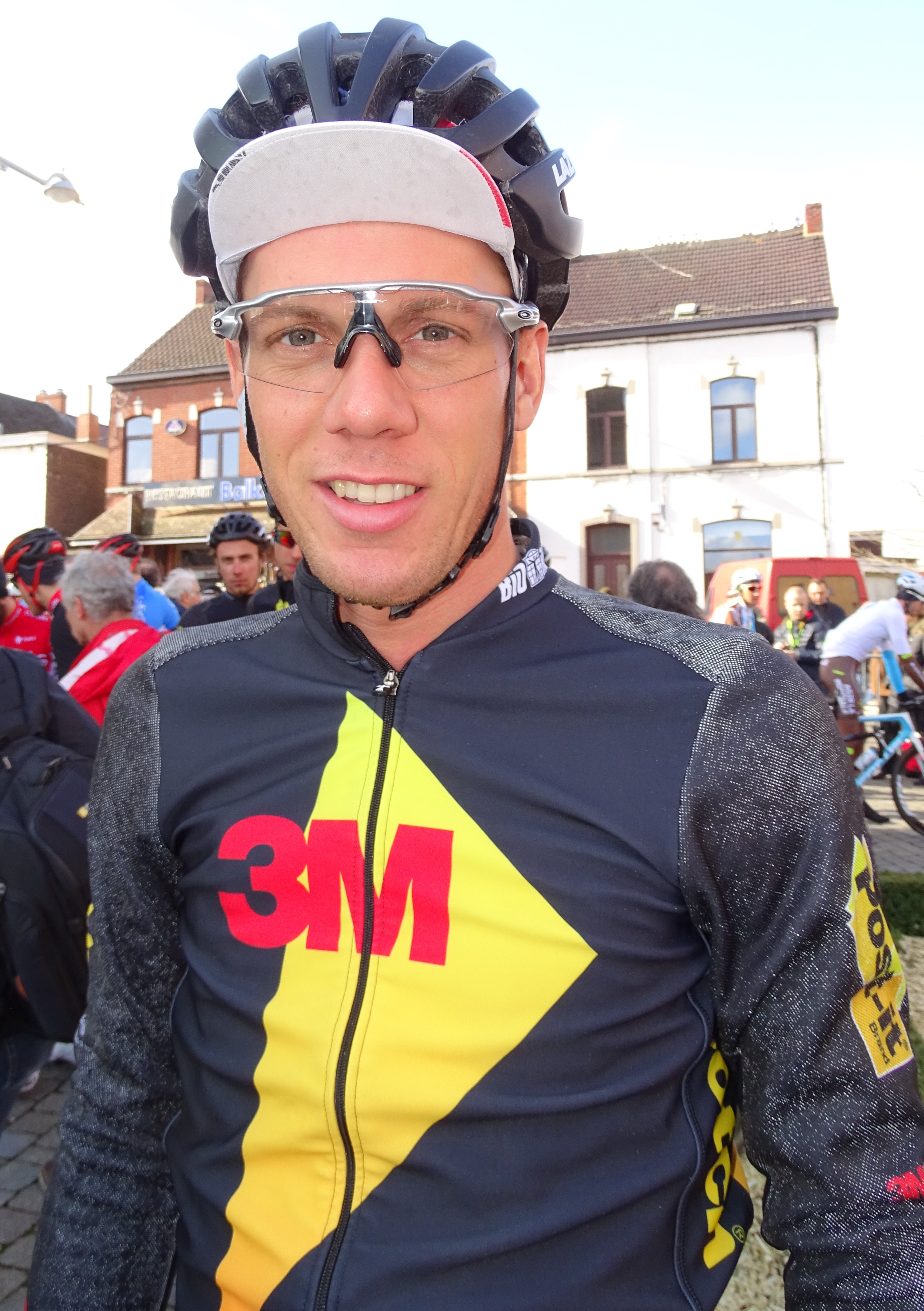 Reportage réalisé le mercredi 2 mars à l'occasion du départ du Samyn des Dames 2016 et du Samyn 2016 à Quaregnon, Belgique.